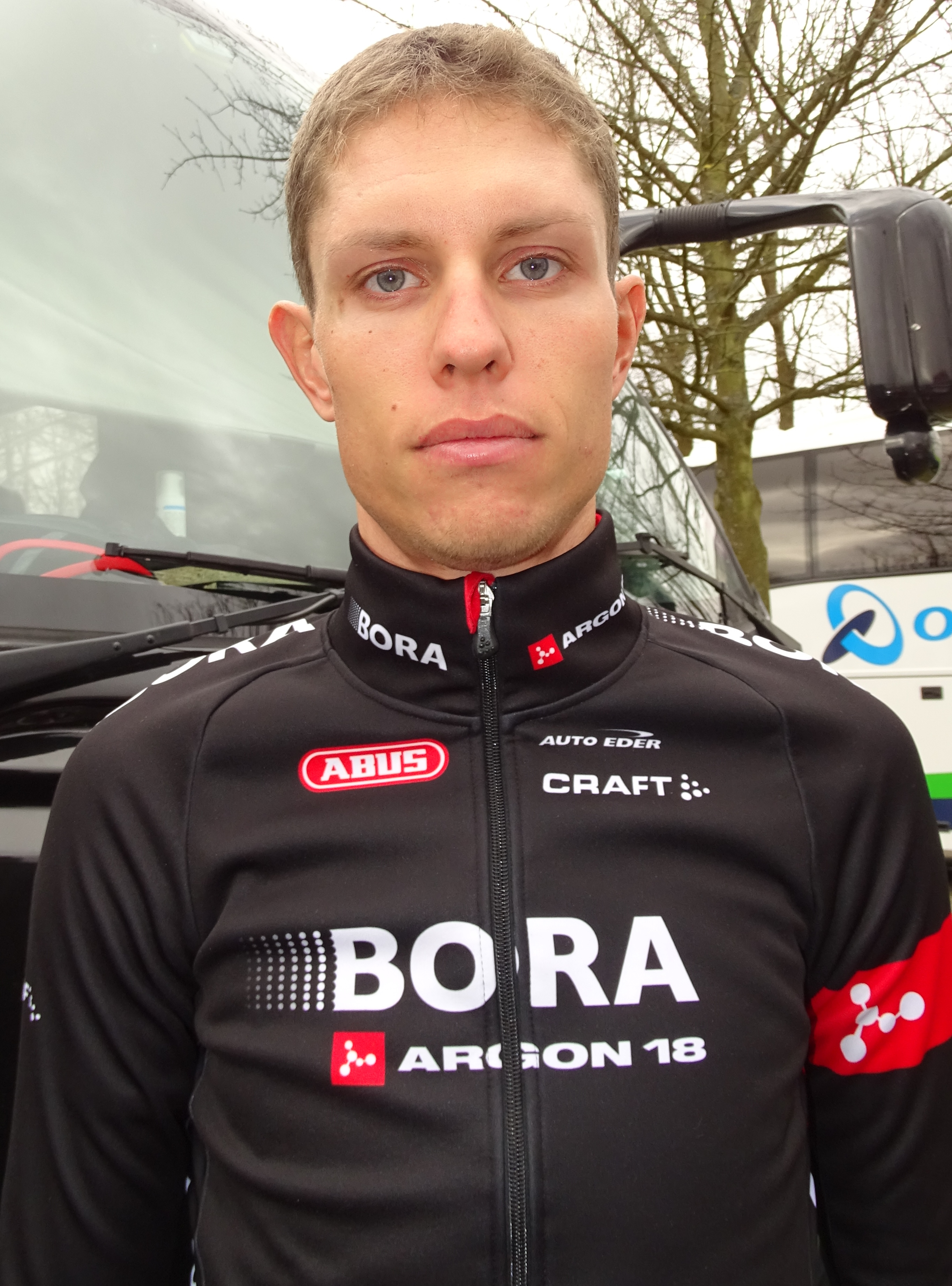 Reportage réalisé le mercredi 1er avril à l'occasion du départ de la deuxième étape des Trois jours de La Panne 2015 à Zottegem, Belgique.